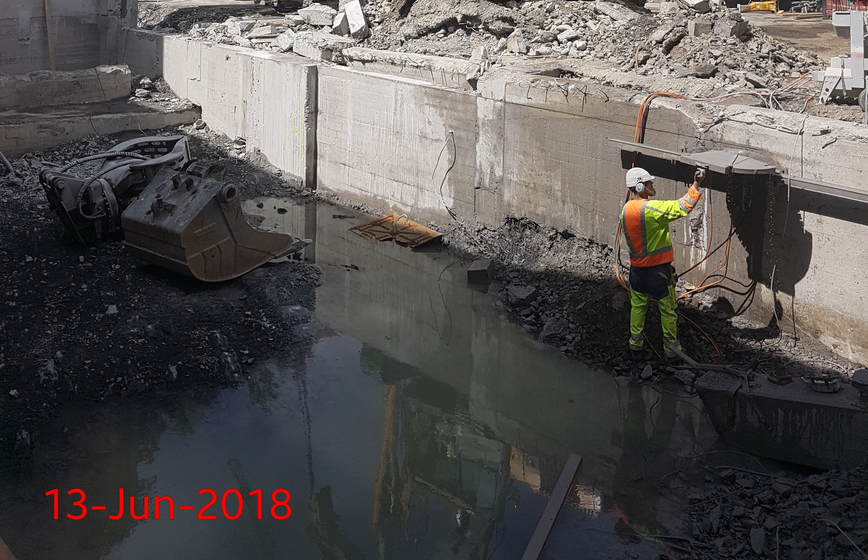 Betongsaging av 400mm tykk vegg